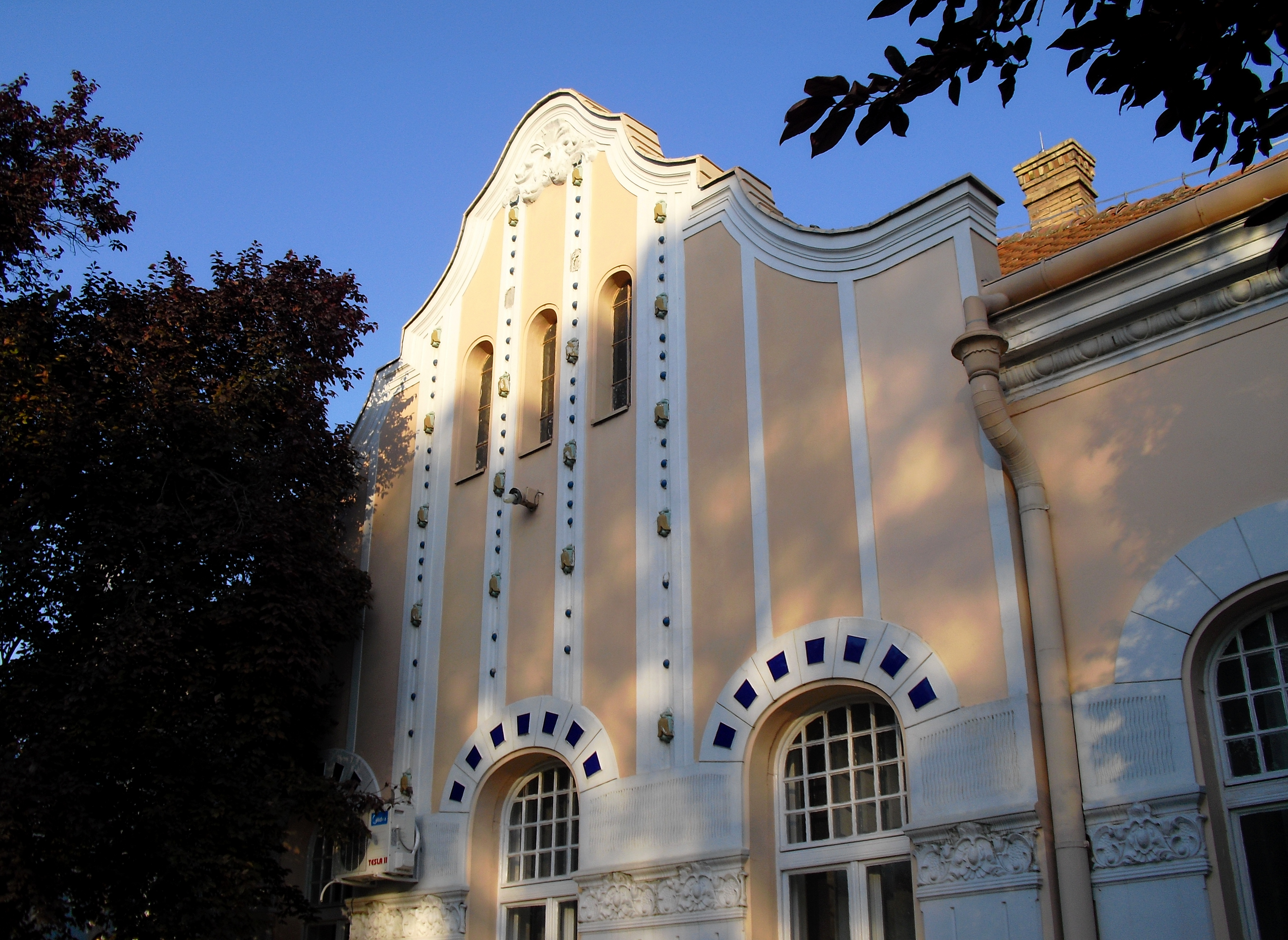 Зграда у Врбасу,улица М. Тита 42...